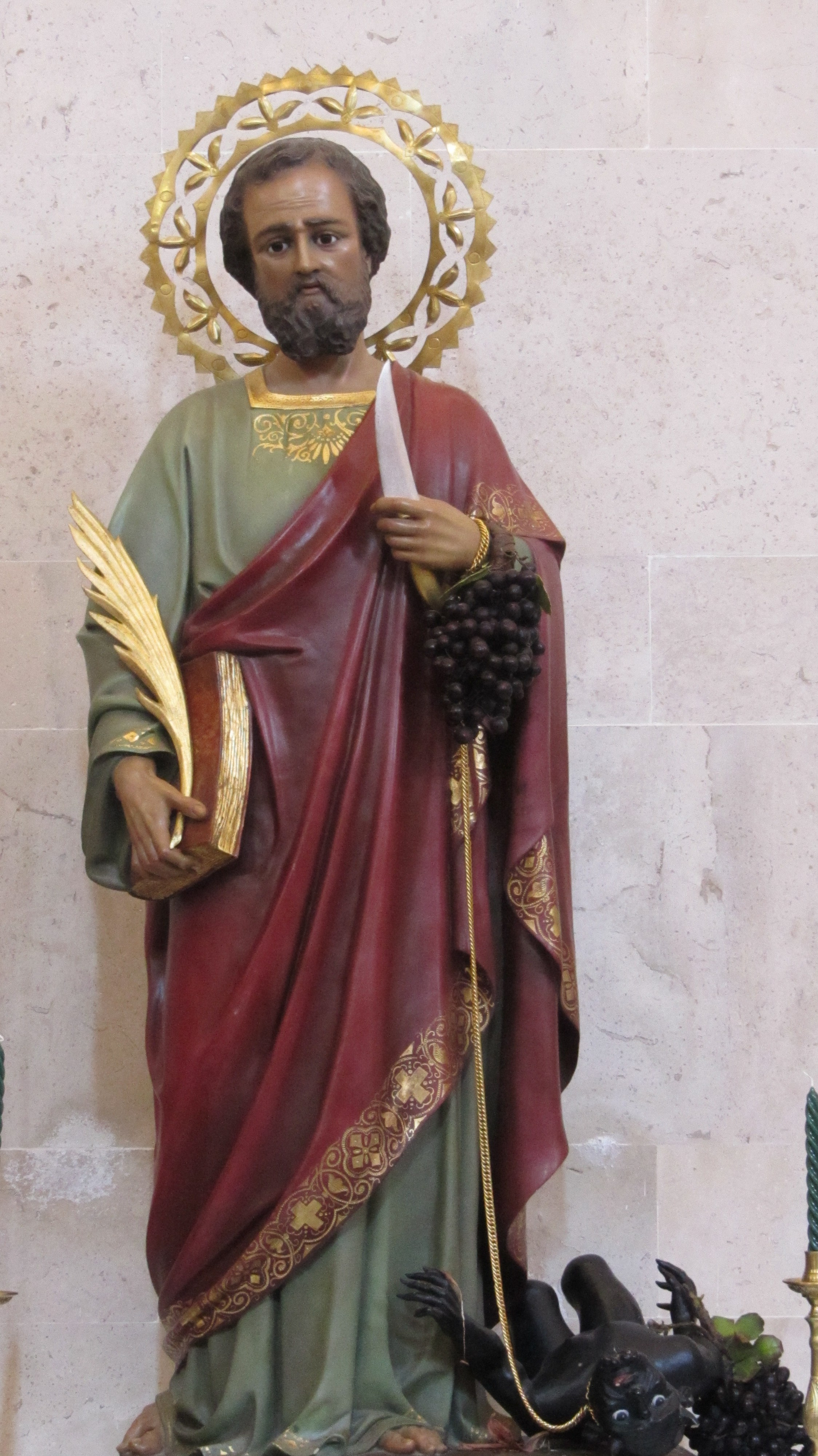 Imagen de San Bartolomé en la iglesia de Nuestra Señora de la Asunción, patrón de Vellisca (Cuenca - España)